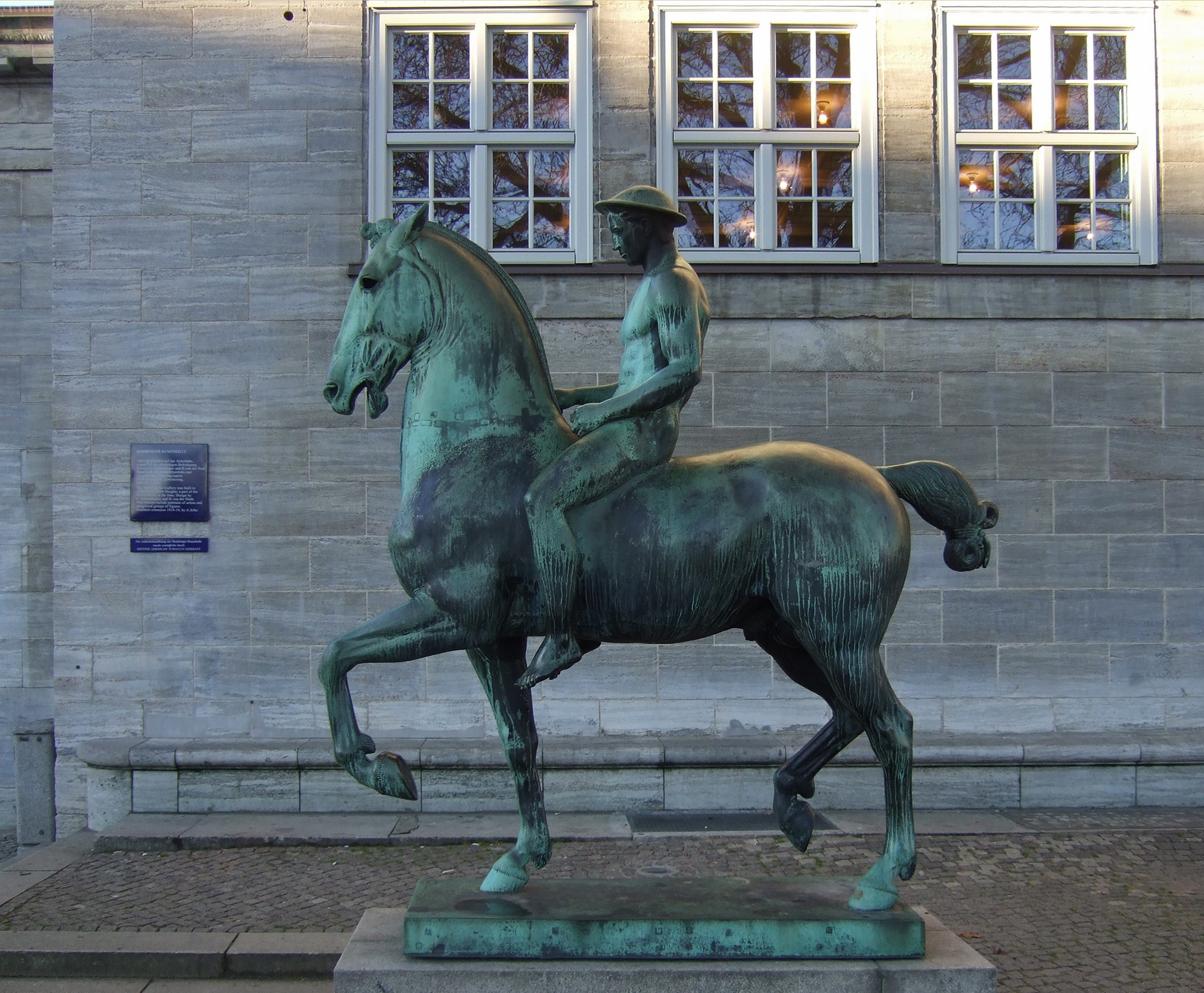 Der junge Reiter von Hermann Hahn (1908) neben der Hamburger Kunsthalle.